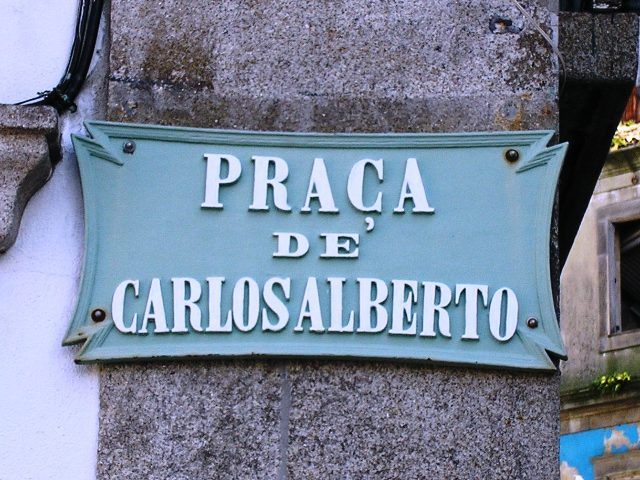 "Carlos Alberto" square sign in Porto, Portugal.